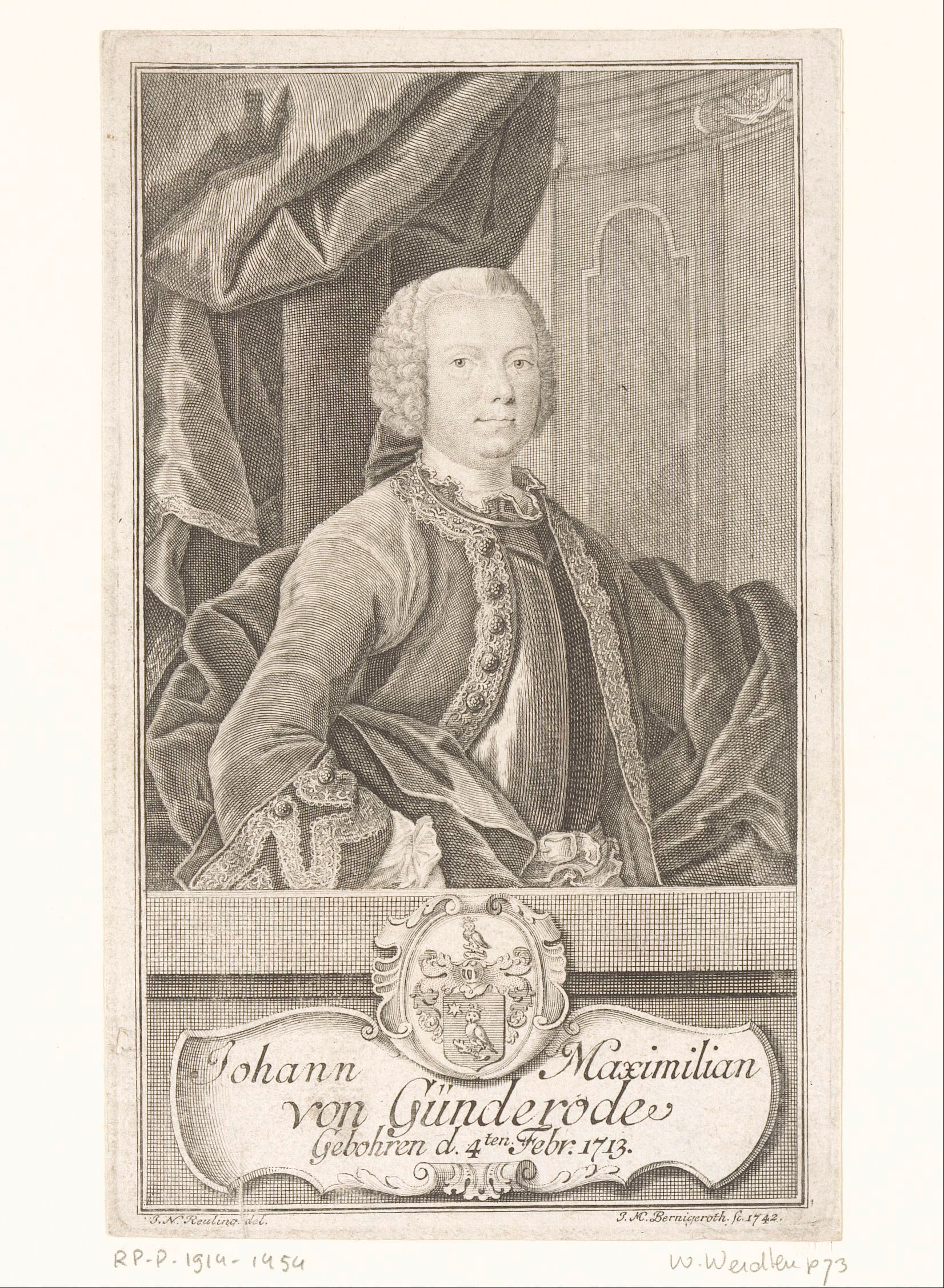 IdentificatieTitel(s): Portret van Johann Maximilian von GünderrodeObjecttype: prent Objectnummer: RP-P-1914-1454Catalogusreferentie: HAB A 8361Opschriften / Merken: verzamelaarsmerk, verso, gestempeld: Lugt 2228VervaardigingVervaardiger: prentmaker: Johann Martin Bernigeroth (vermeld op object)naar tekening van: Johann Nepomuk Reuling (vermeld op object)Plaats vervaardiging: LeipzigDatering: 1742Fysieke kenmerken: gravure met stippelwerkMateriaal: papier Techniek: graveren (drukprocedé) / stippelwerkAfmetingen: plaatrand: h 165 mm × b 98 mmToelichtingPrent ook gebruikt in: Günderrode, Johann Maximilian von. Abhandlung des Teutschen Staats-Rechts (...). Gießen: Johann Philipp Krieger, 1743.OnderwerpWat: historical personsWie: Johann Maximilian von GünderrodeVerwerving en rechtenVerwerving: aankoop 1905Copyright: Publiek domein